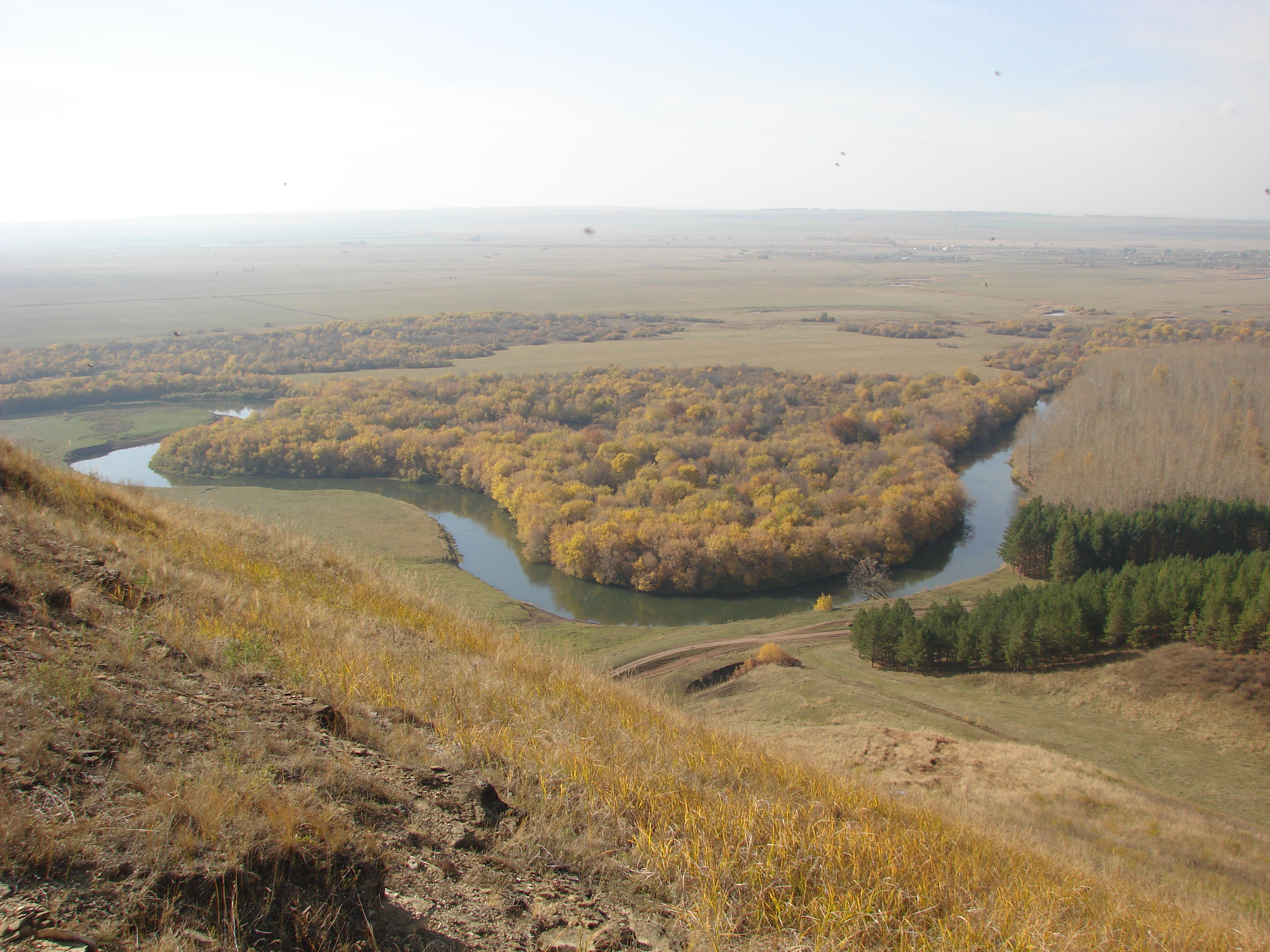 Река Ик, Азнакаевский район This image is related to the protected area of Russia number 1610007